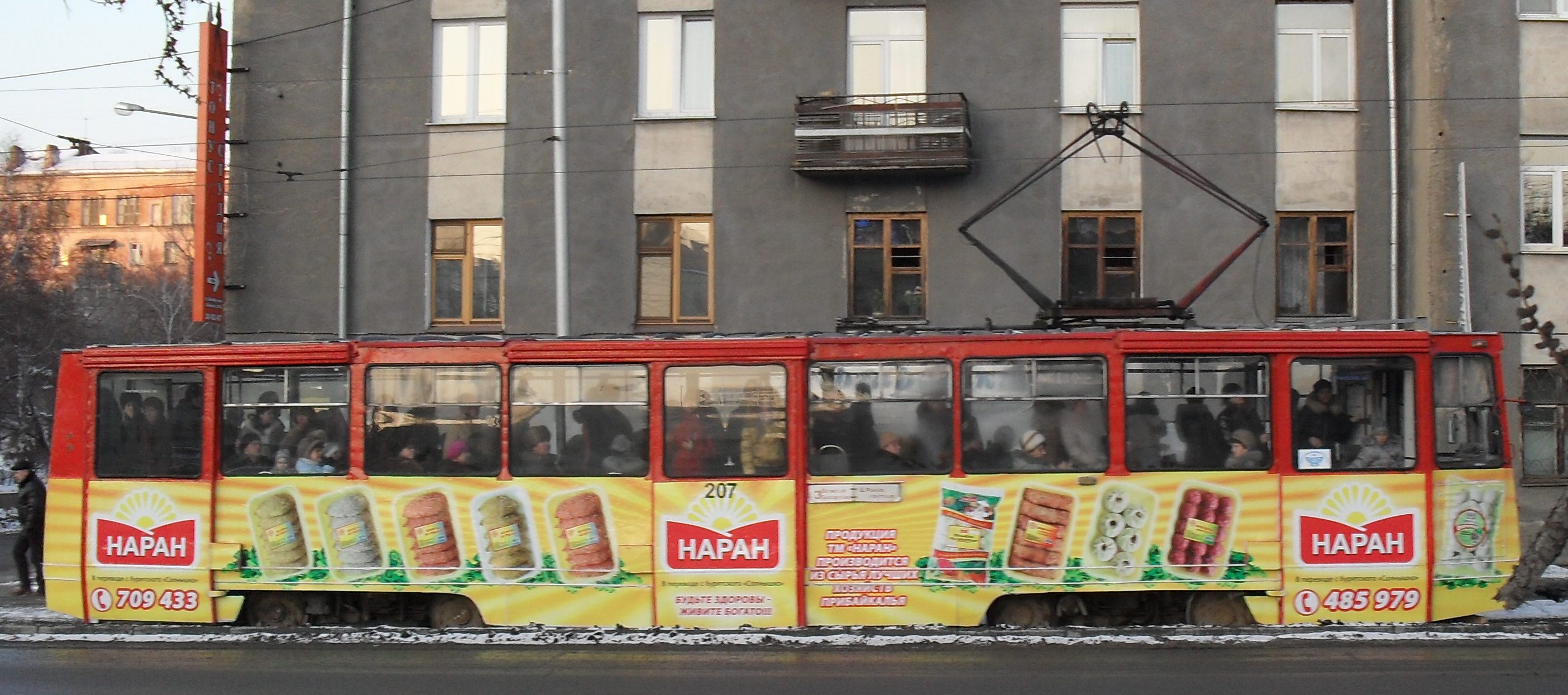 Иркутск.Трамвай на улице Декабрьских событий. Вагон модели КТМ-5.